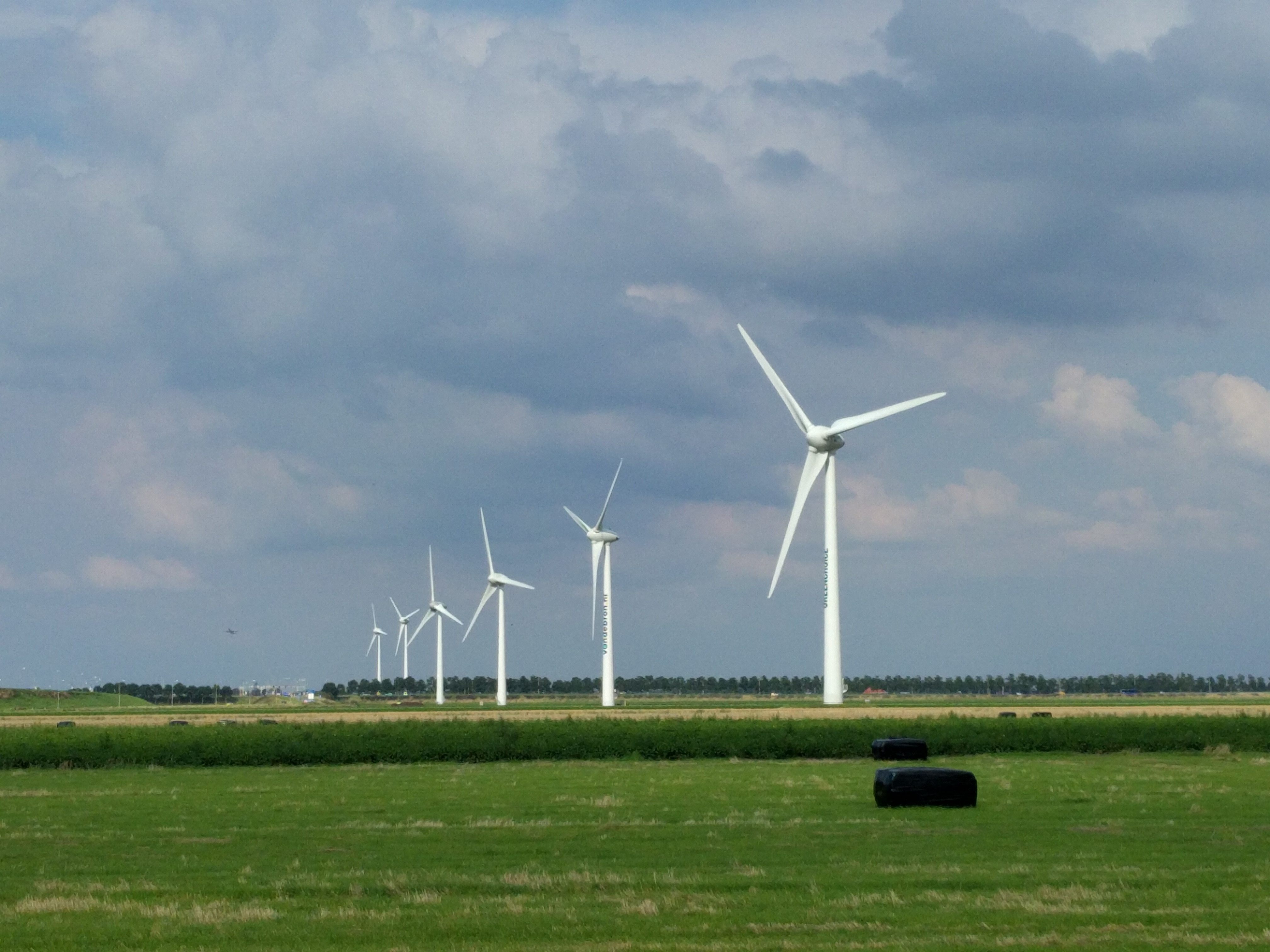 Windmolens maken overuren aan de Lisserweg bij Weteringbrug